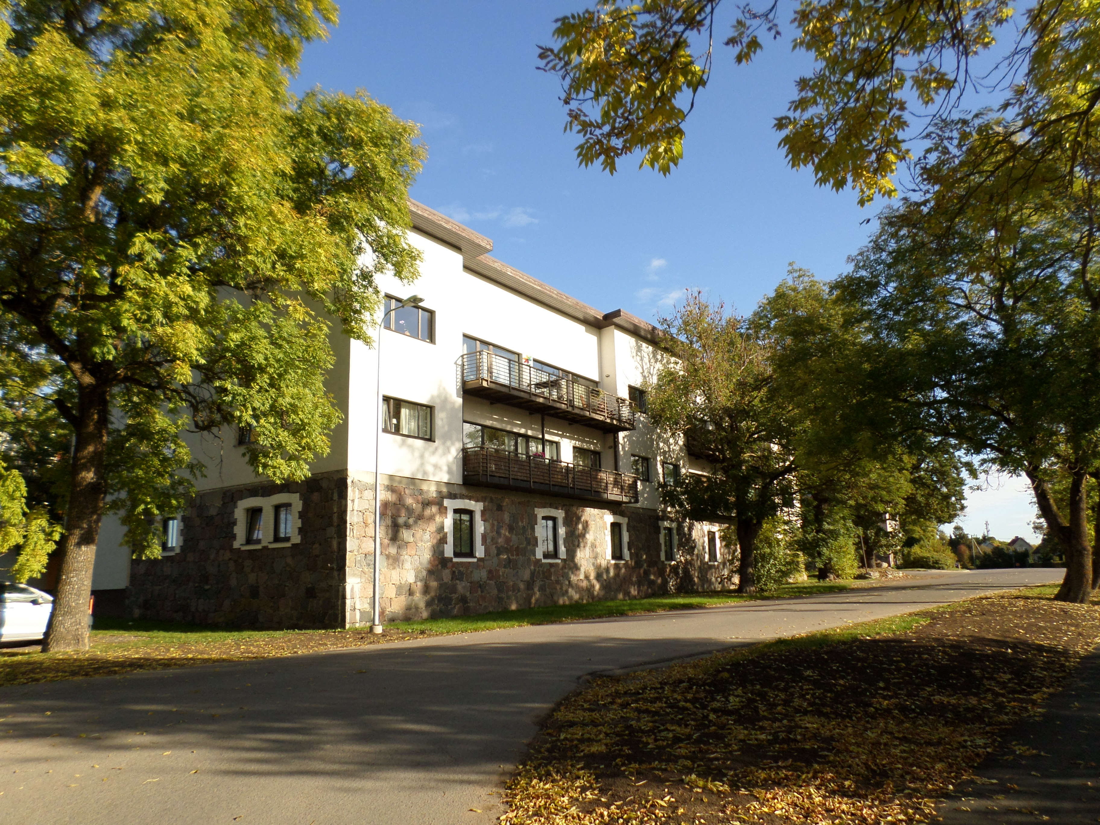 Lehmja mõisa kõrvalhoone vundament.